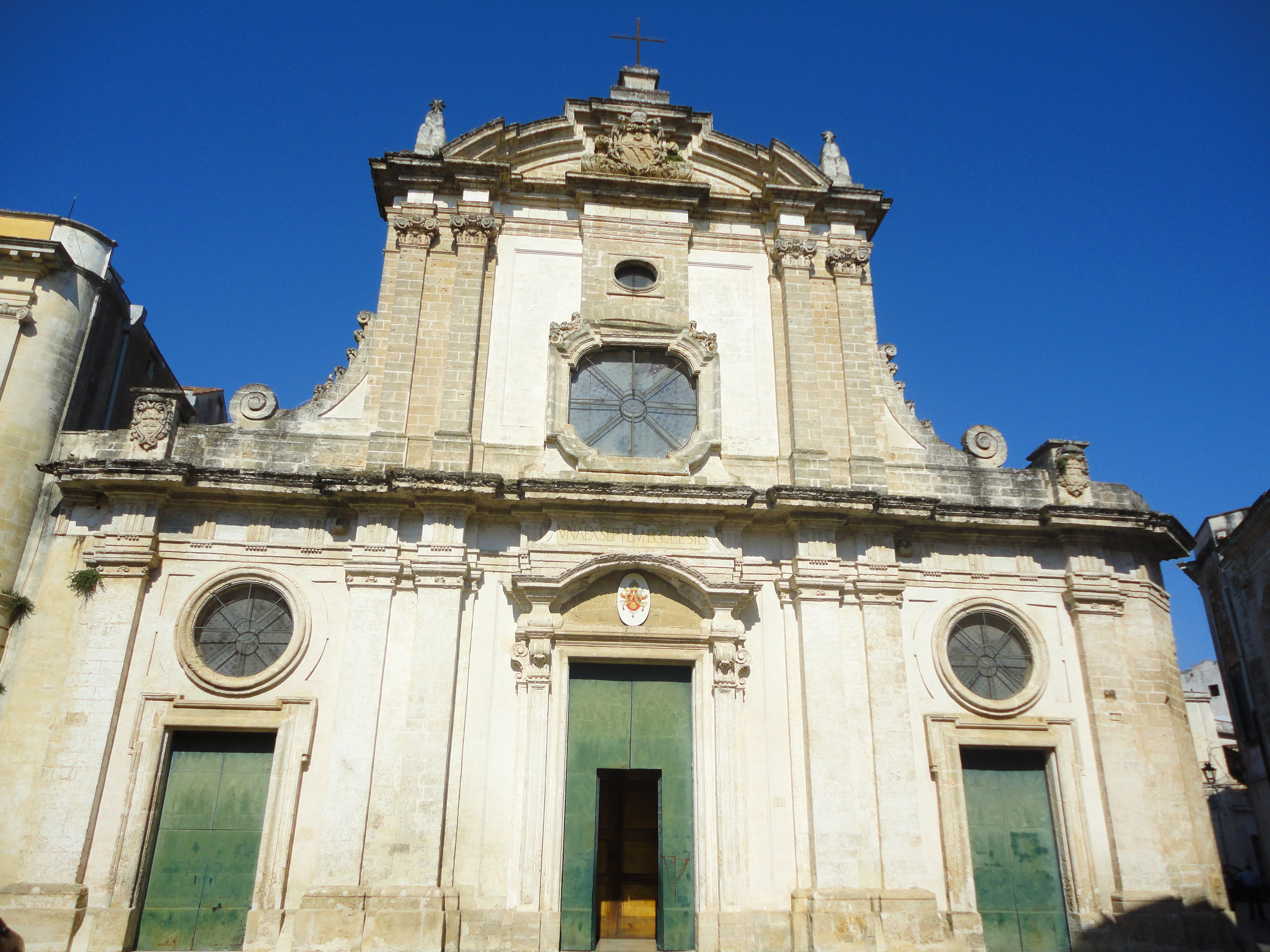 Chiesa Cattedrale di Nardò, Lecce